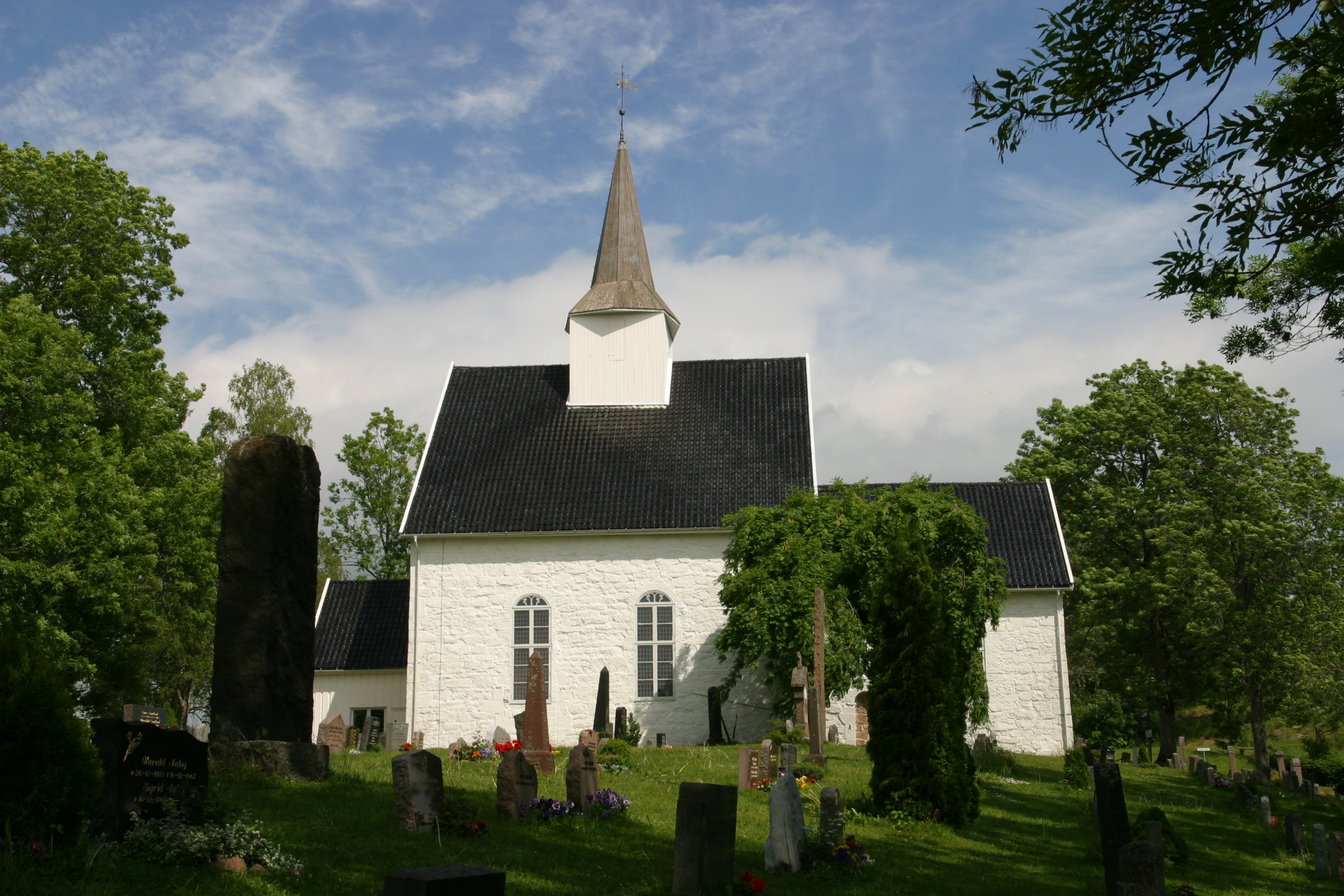 Picture of Røyken kirke (Buskerud - Norway)